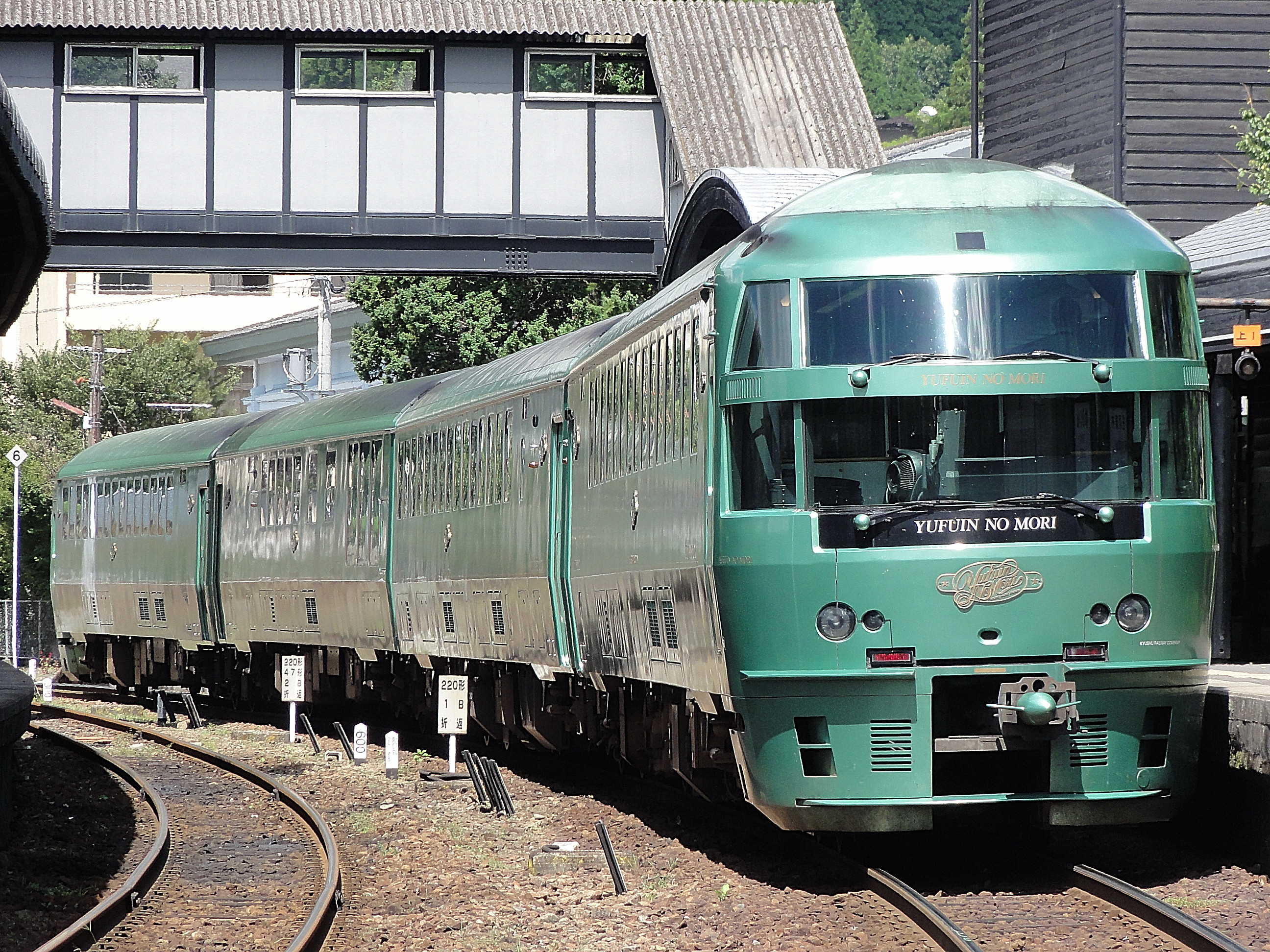 キハ72系気動車